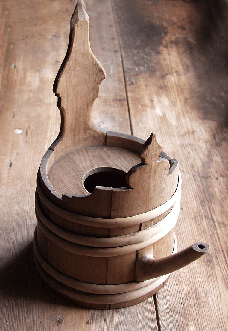 Tankar fra Hovin i Horg i Sør-Trøndelag. Tankaren er lagget av staver i furu, høyde 37,5 cm. Foto Haakon Harriss, Norsk Folkemuseum, NF1922-1159.